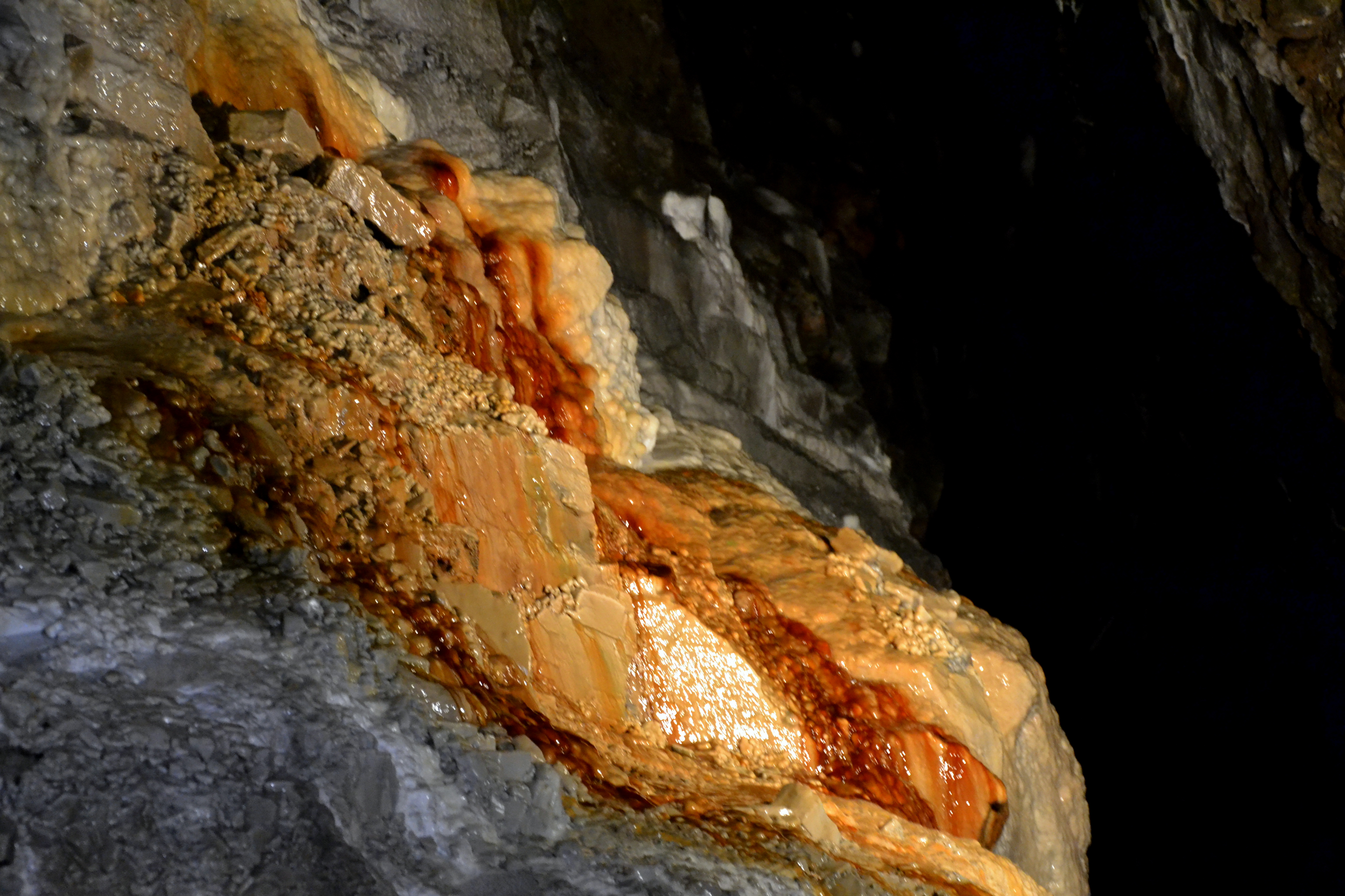 Mines de Bellmunt del Priorat This is a a photo of a geologic site or geotope in Catalonia, Spain, with id: IEIGC-309